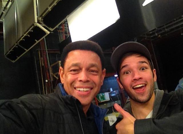 Lane Napper junto a Nathan Kress